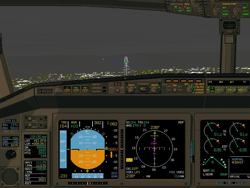 Flugsimulator für Airbus A320 Version 3.0, Anflug auf Paderborn EDLP, Piste 24